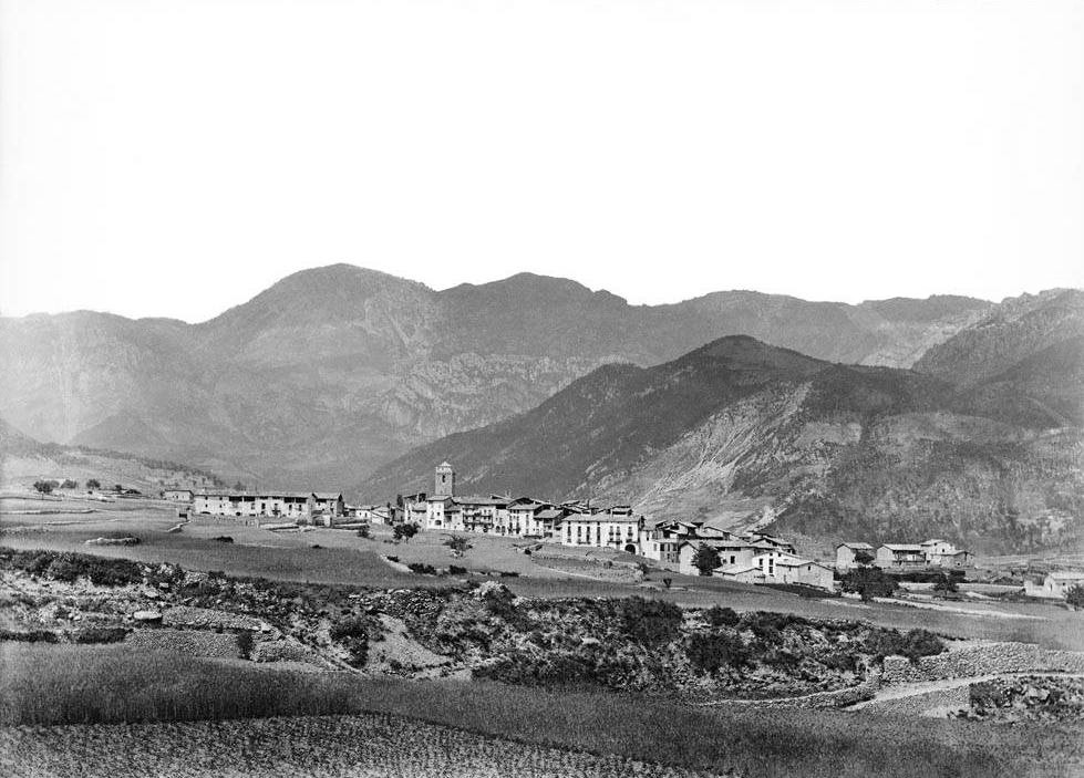 Imatge